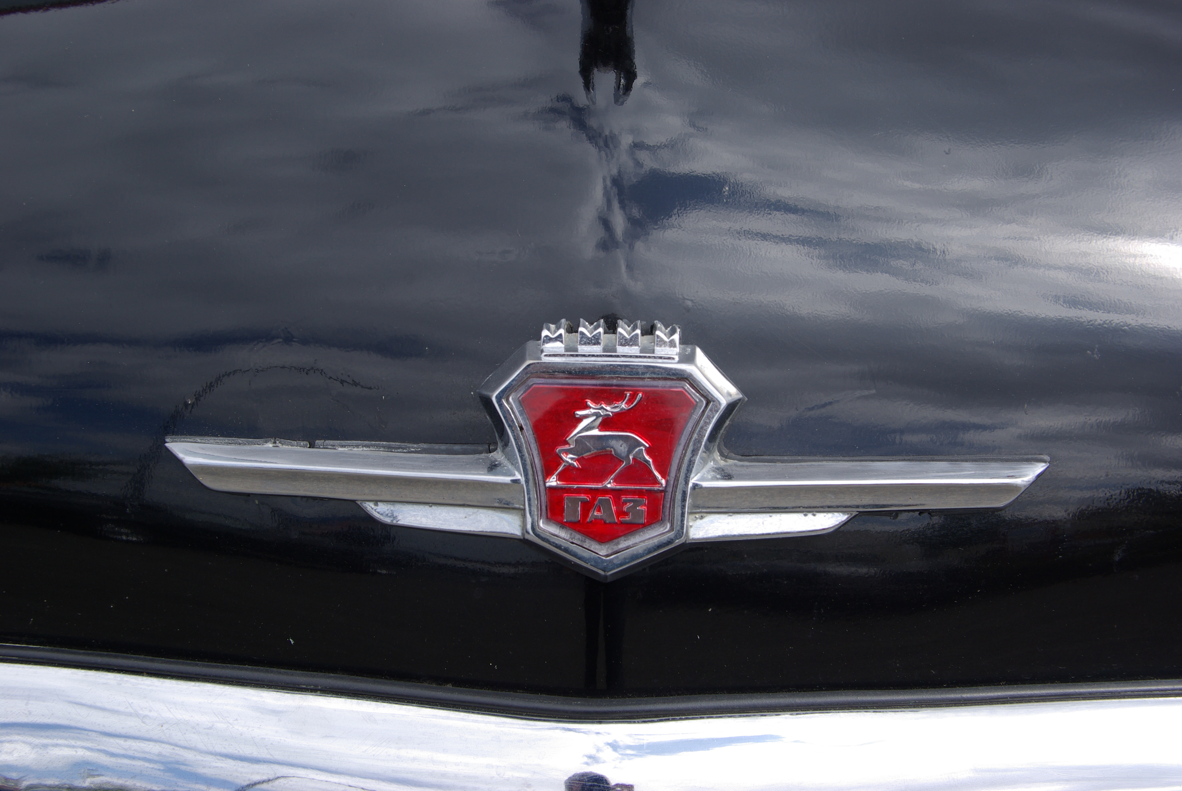 GAZ 21 Wolga, Baujahr 1969, 2500 cm³, 4 Zyl., 75 PS, Bitburg Classic 2012